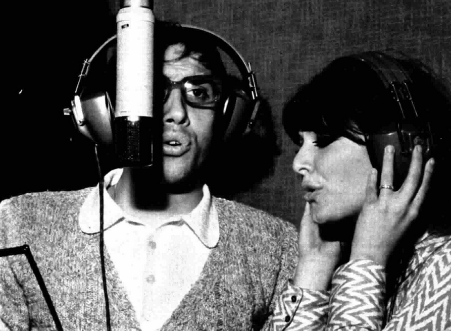 Italian singers Adriano Celentano and Claudia Mori